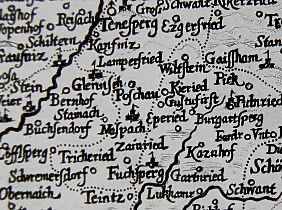 Ausschnitt aus Landkarte Bayern (1663)